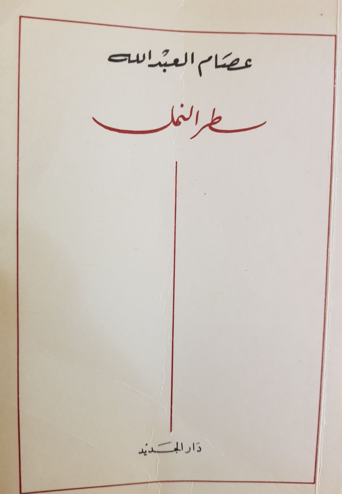 كتاب ديوان سطر النمل